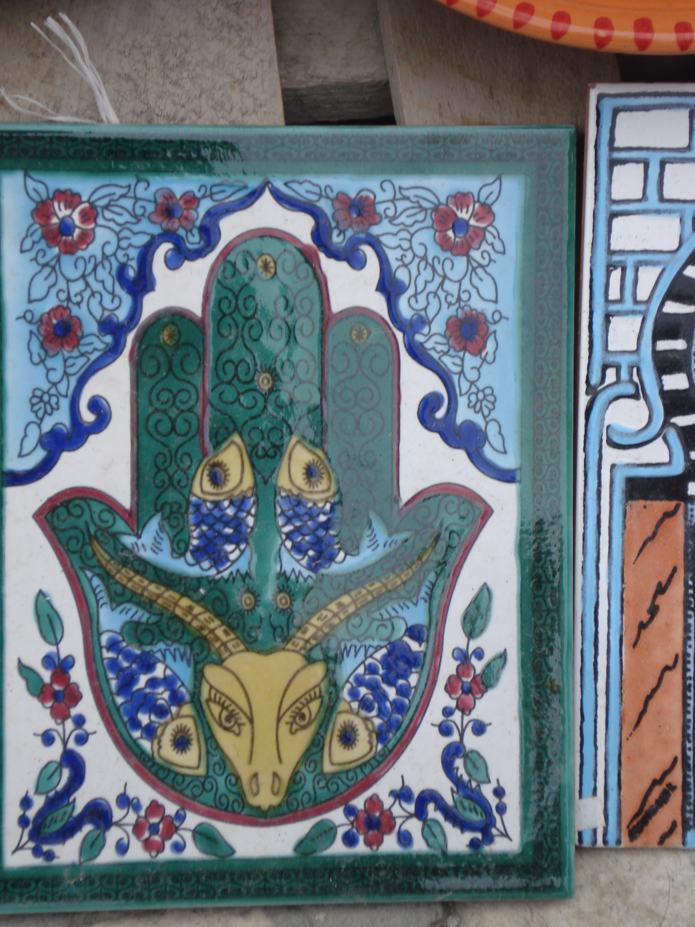 Khamsa dessiné sur une plaque à la médina de Kairouan (Tunisie)